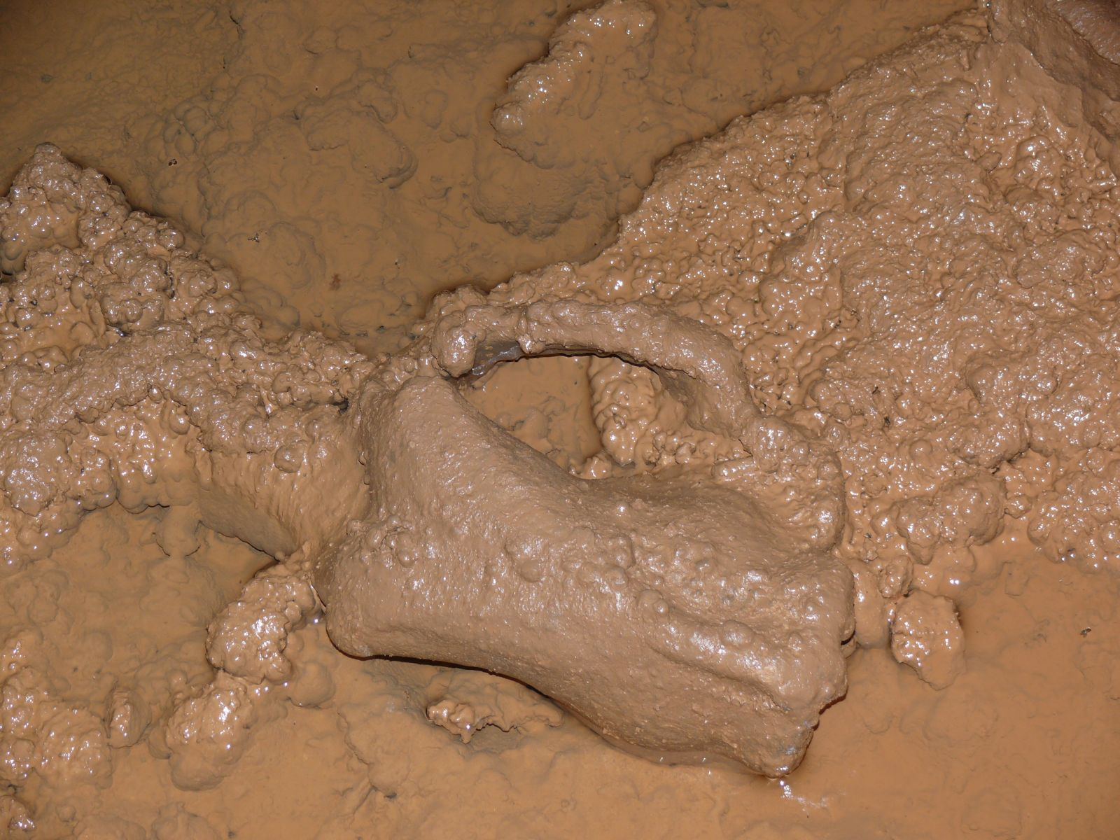 Höhlenbär (Ursus spelaeus), Schädel, Zoolithenhöhle, Bayern